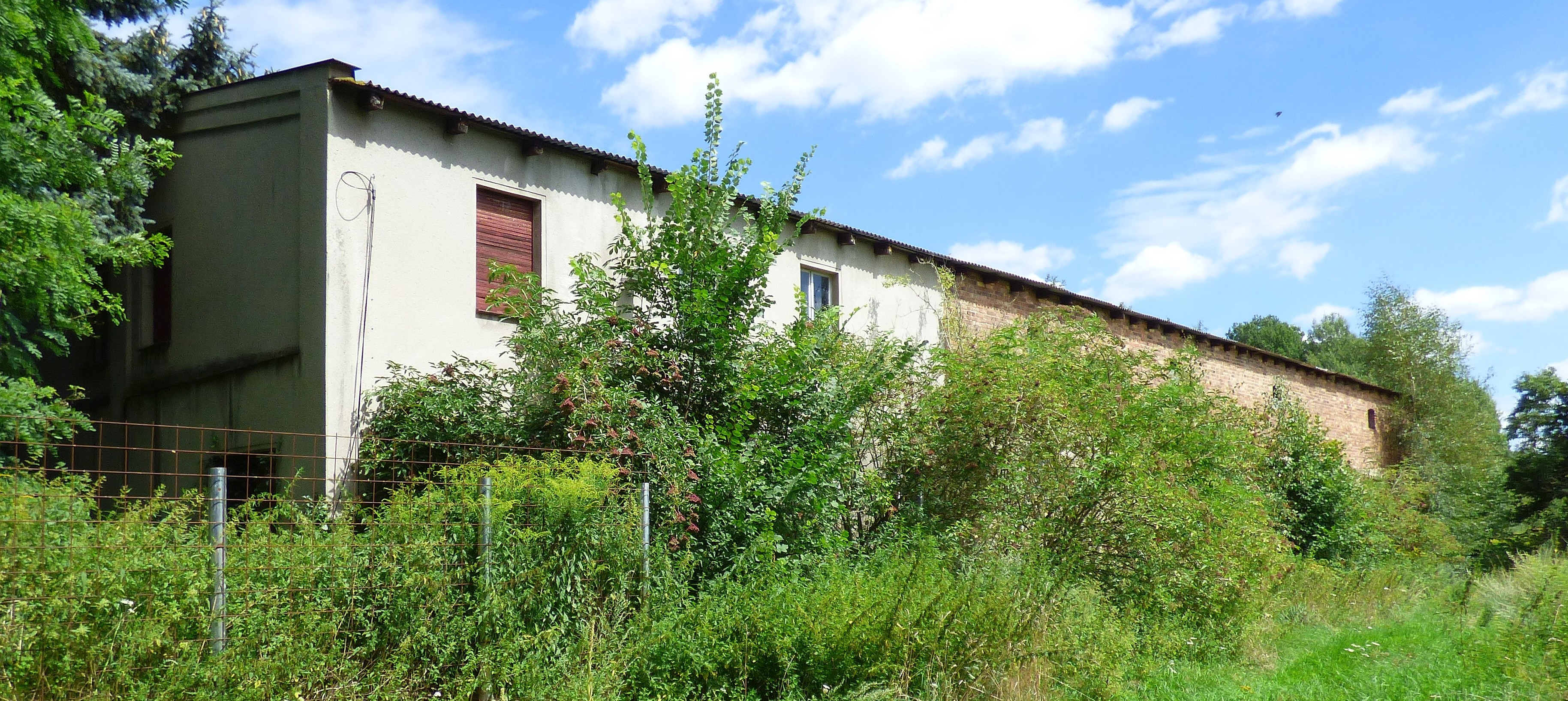 Wohnstallhaus am Vorwerk Schradenau 2017 in Schraden